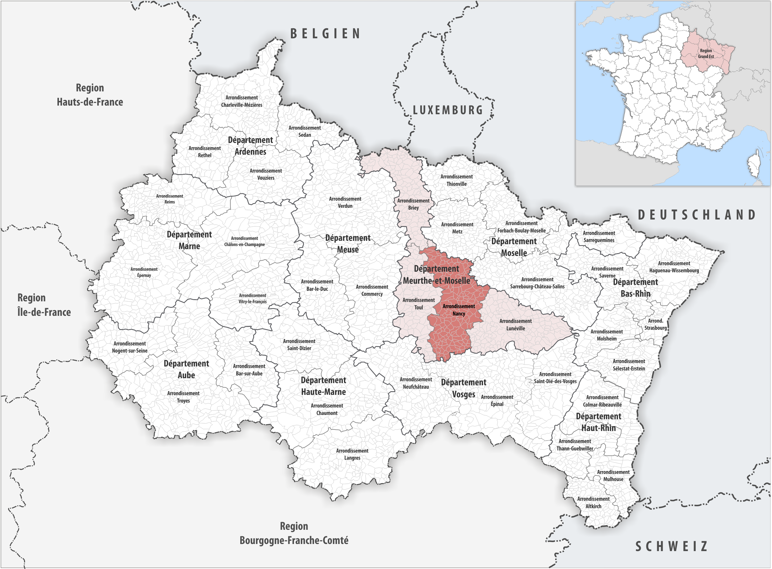 Lage des Arrondissements Nancy